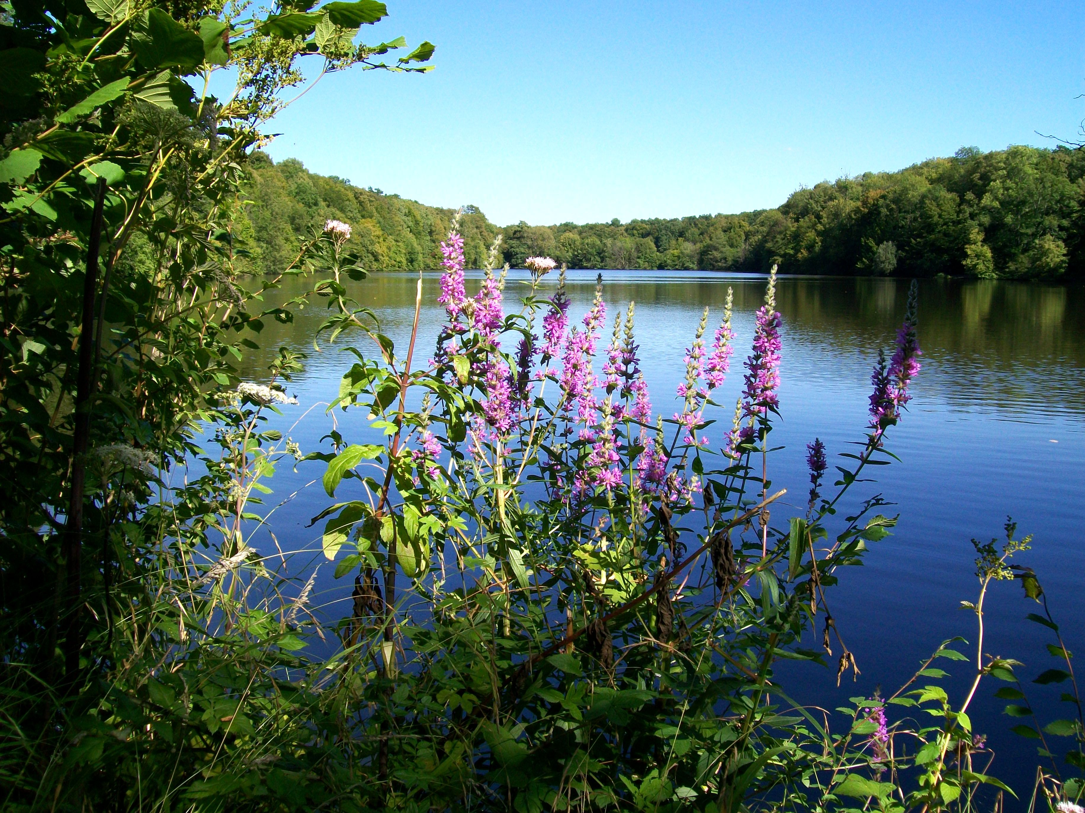 L'étang Chapron vu depuis la digue entre cet étang et l'Étang Neuf, avec des salicaires au premier plan.